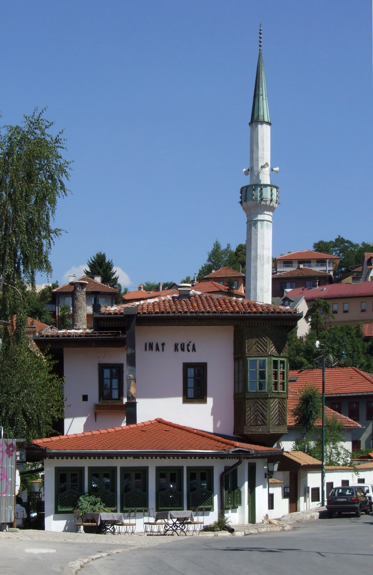 Inat kuća, Sarajevo